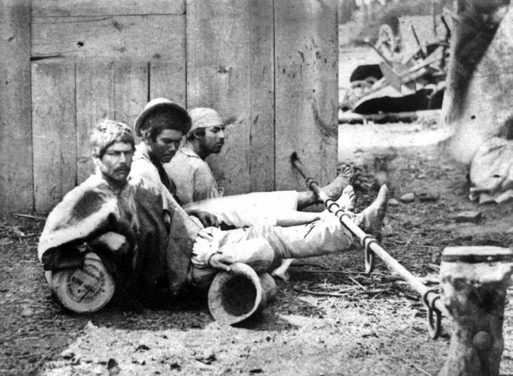 "Castigo recibido por peones borrachos en las faenas del ingeniero Enrique Meiggs en el siglo XIX”"Peones castigados en la barra en Troncoso, Angostura"